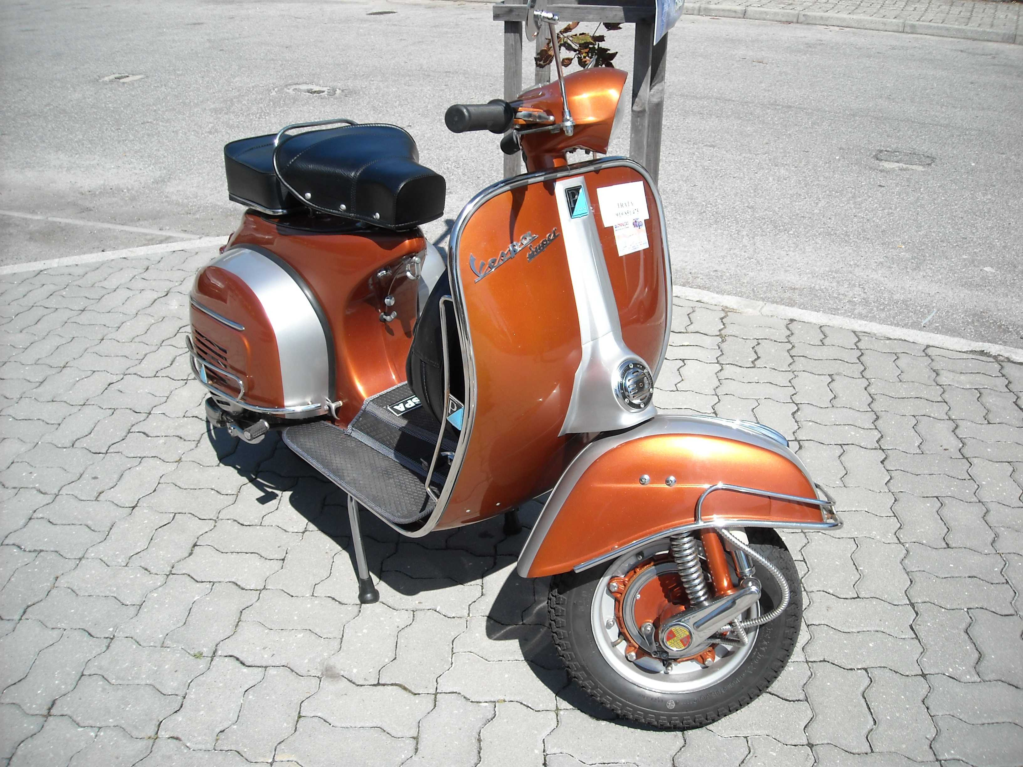 Motos, Caramulo Motorfestival, 2008